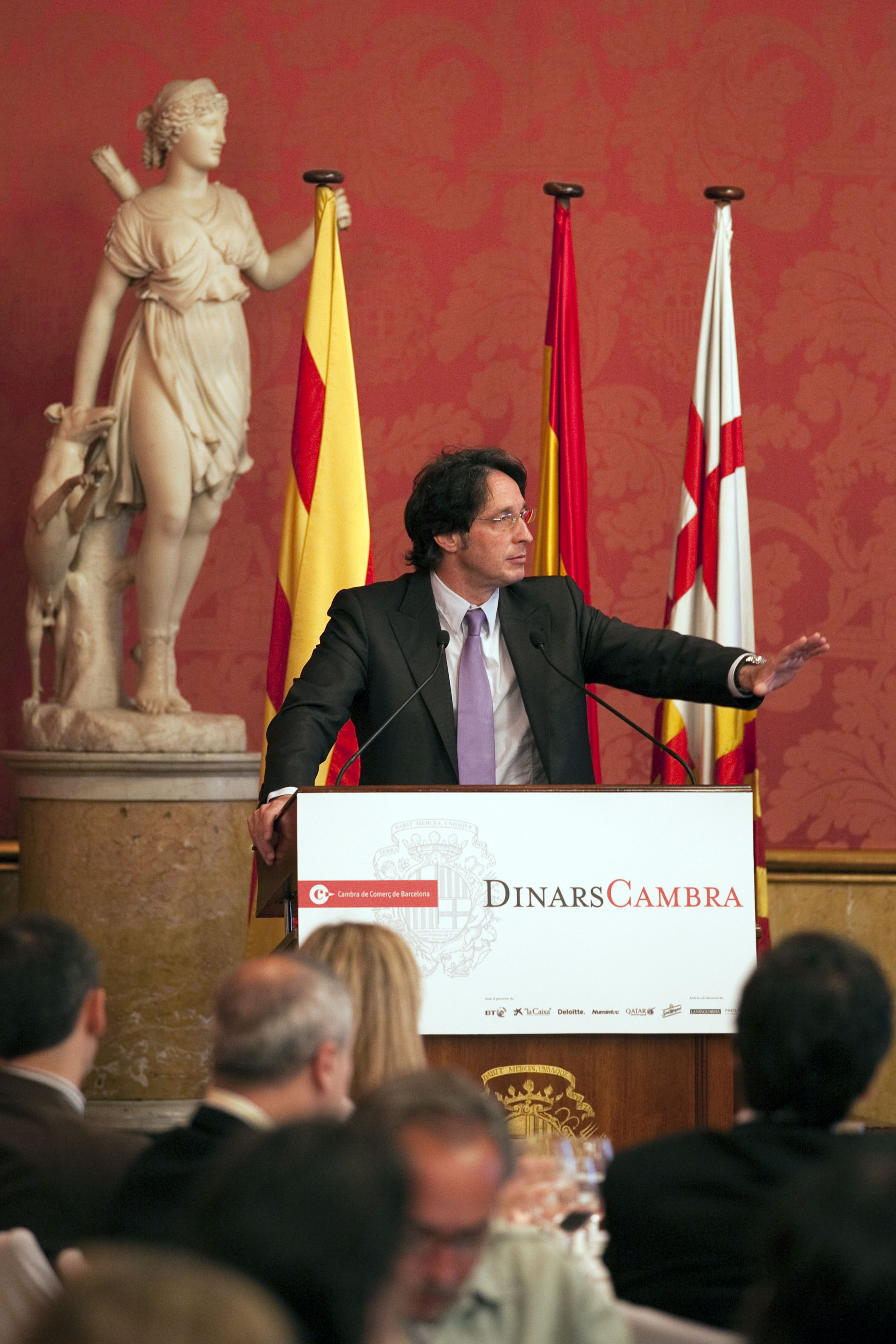 El candidat a l'alcaldia de Barcelona per la coalició Unitat per Barcelona i president del Grup Municipal d'ERC (Esquerra Republicana de Catalunya), Jordi Portabella, al Dinar Cambra a la Casa Llotja de Mar.